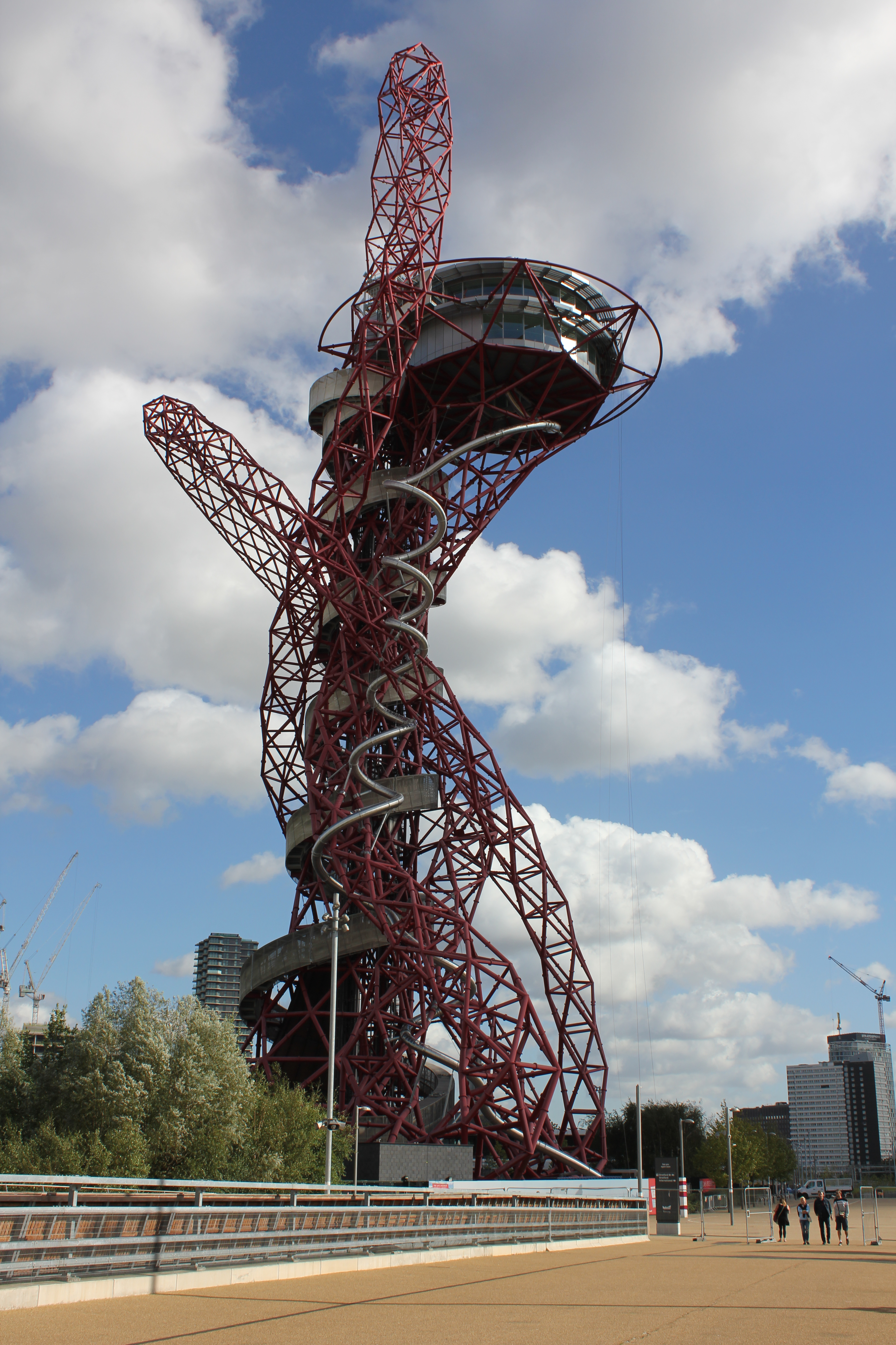 London ArcelorMittal Orbit September 2016